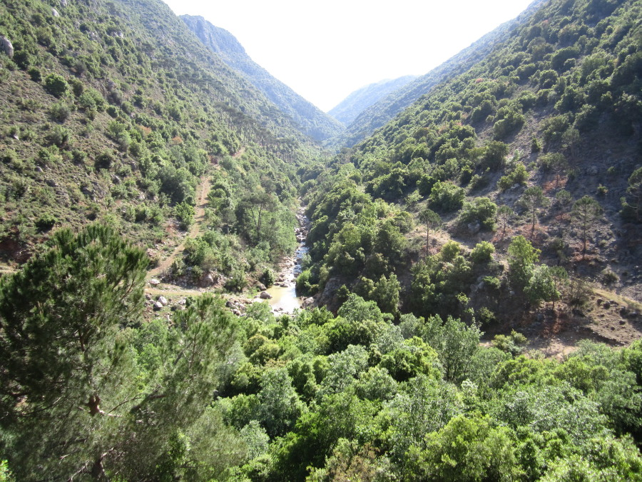 left side Caza meten - right side Caza Baabda